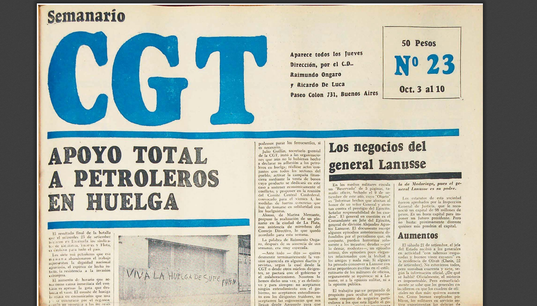 Publicacion del Semanario de la CGT de los Argentinos. de divulgacion Publica